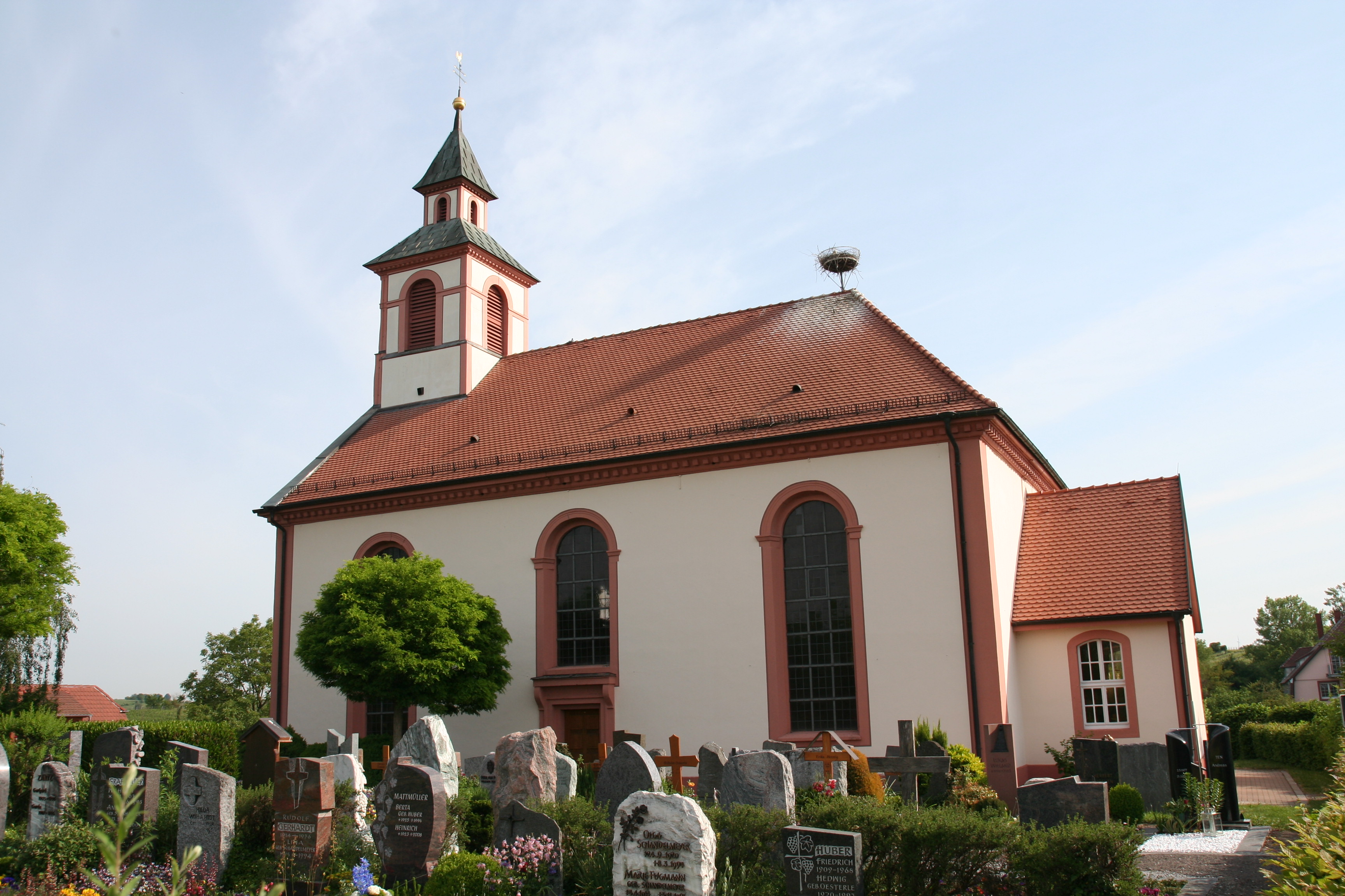 Ev. Kirche Tutschfelden